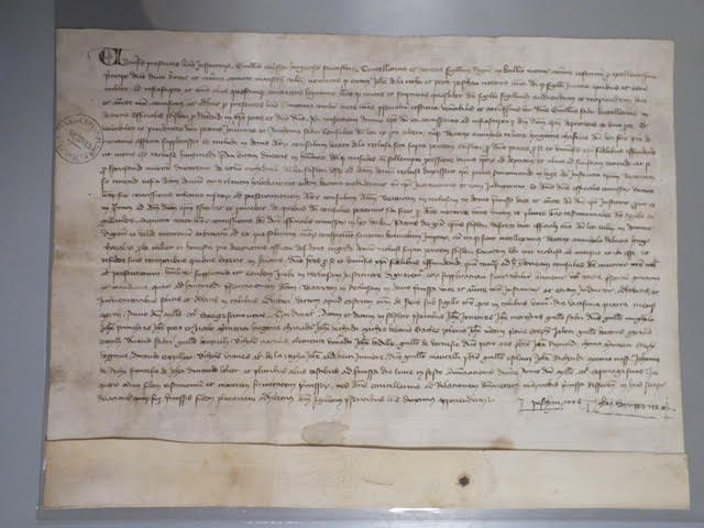 Extrait manuscrit